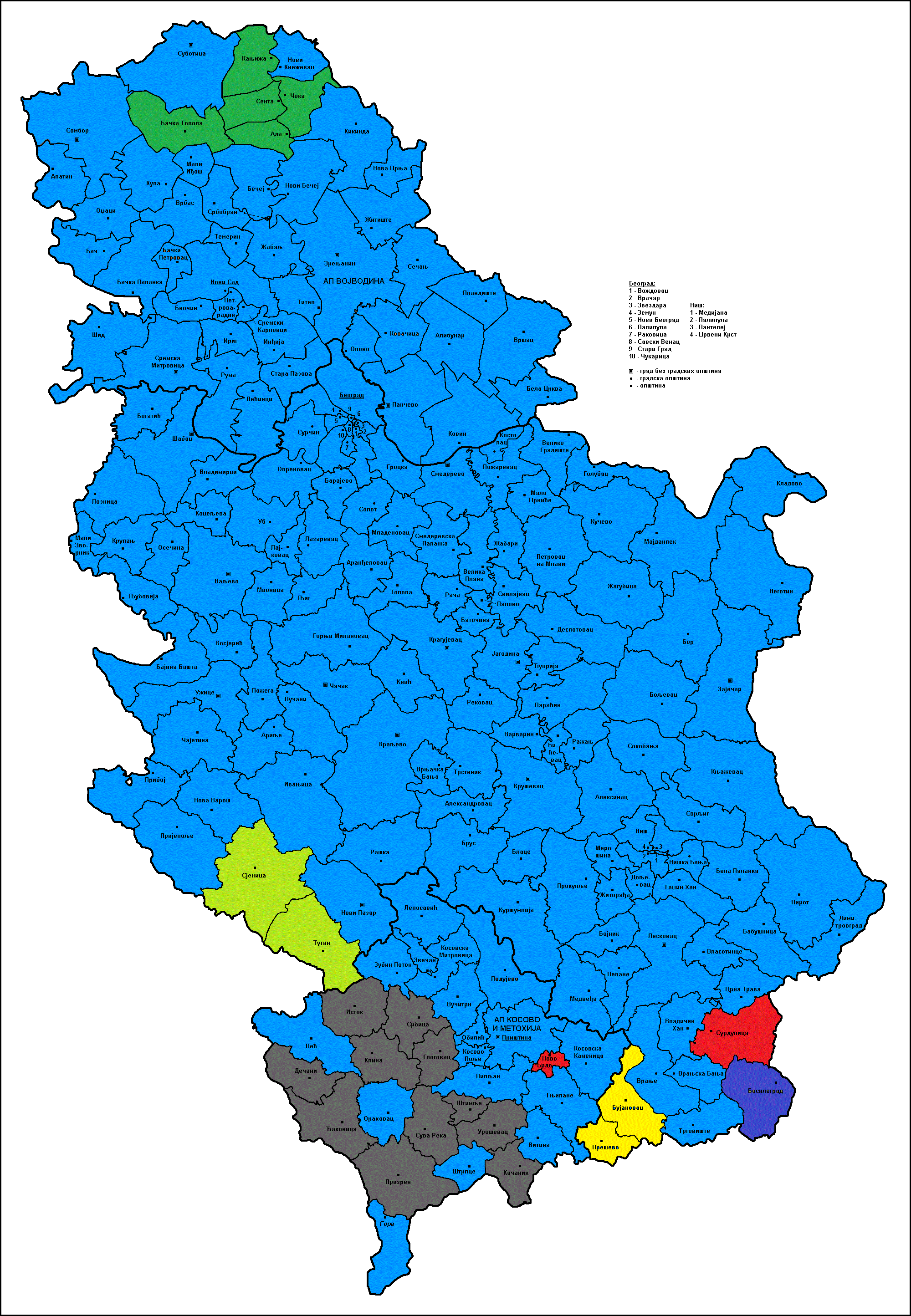 izbori 2014 mapa